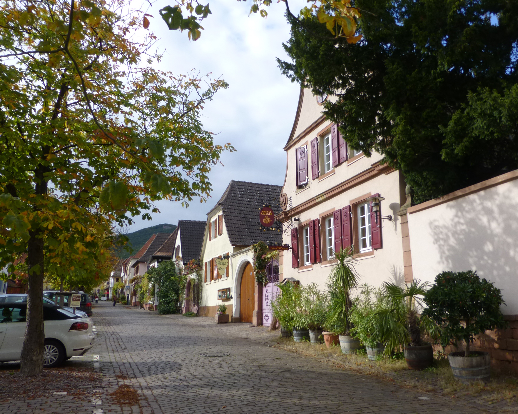 Rhodt unter Rietburg, Theresienstrasse 71, Weingut Krieger.